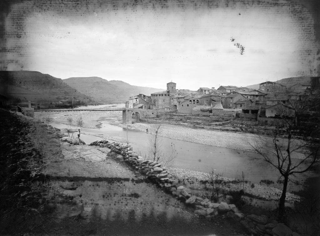 Imatge